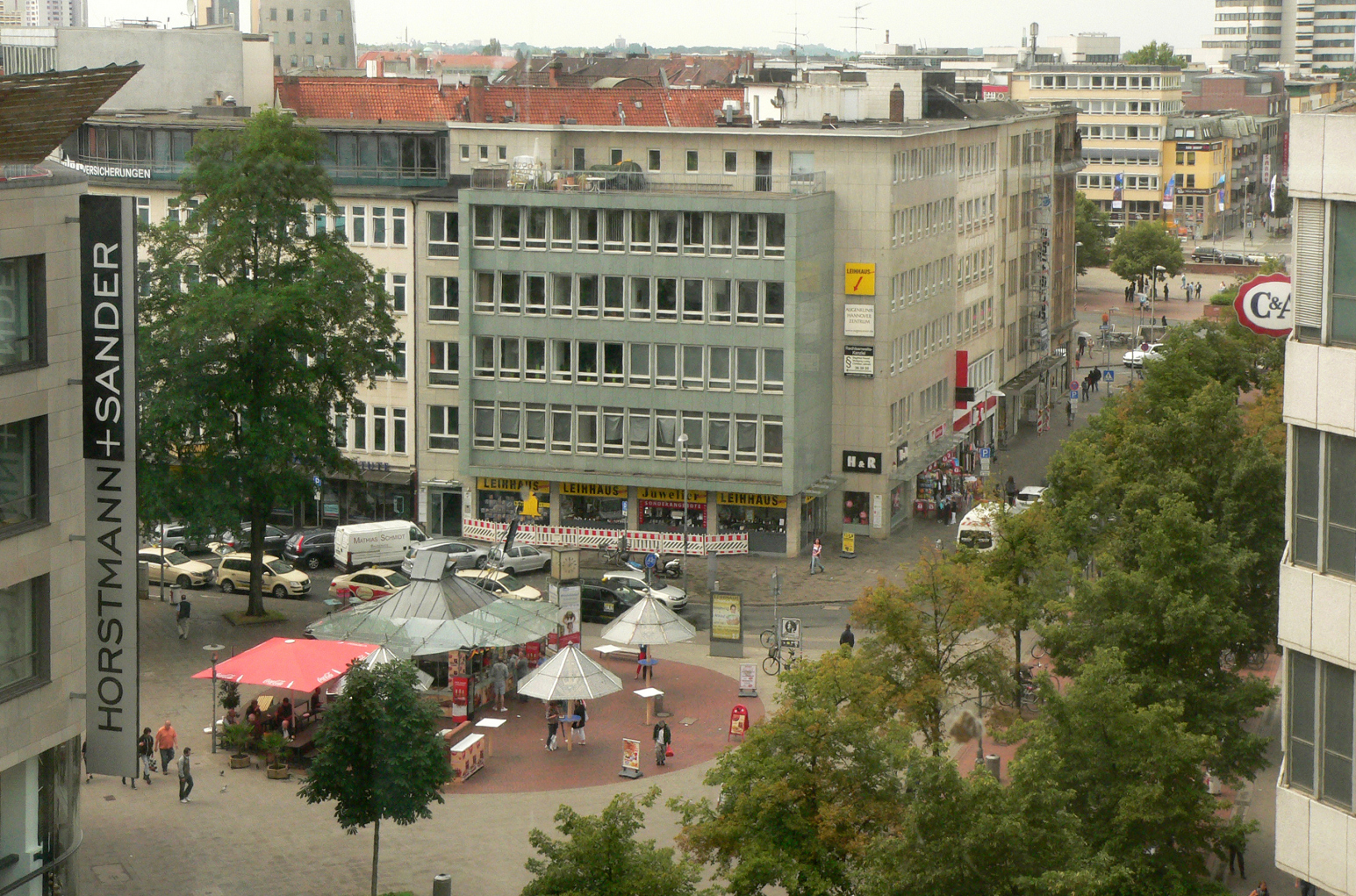 Georgstraße Hannover Richtung Steintor